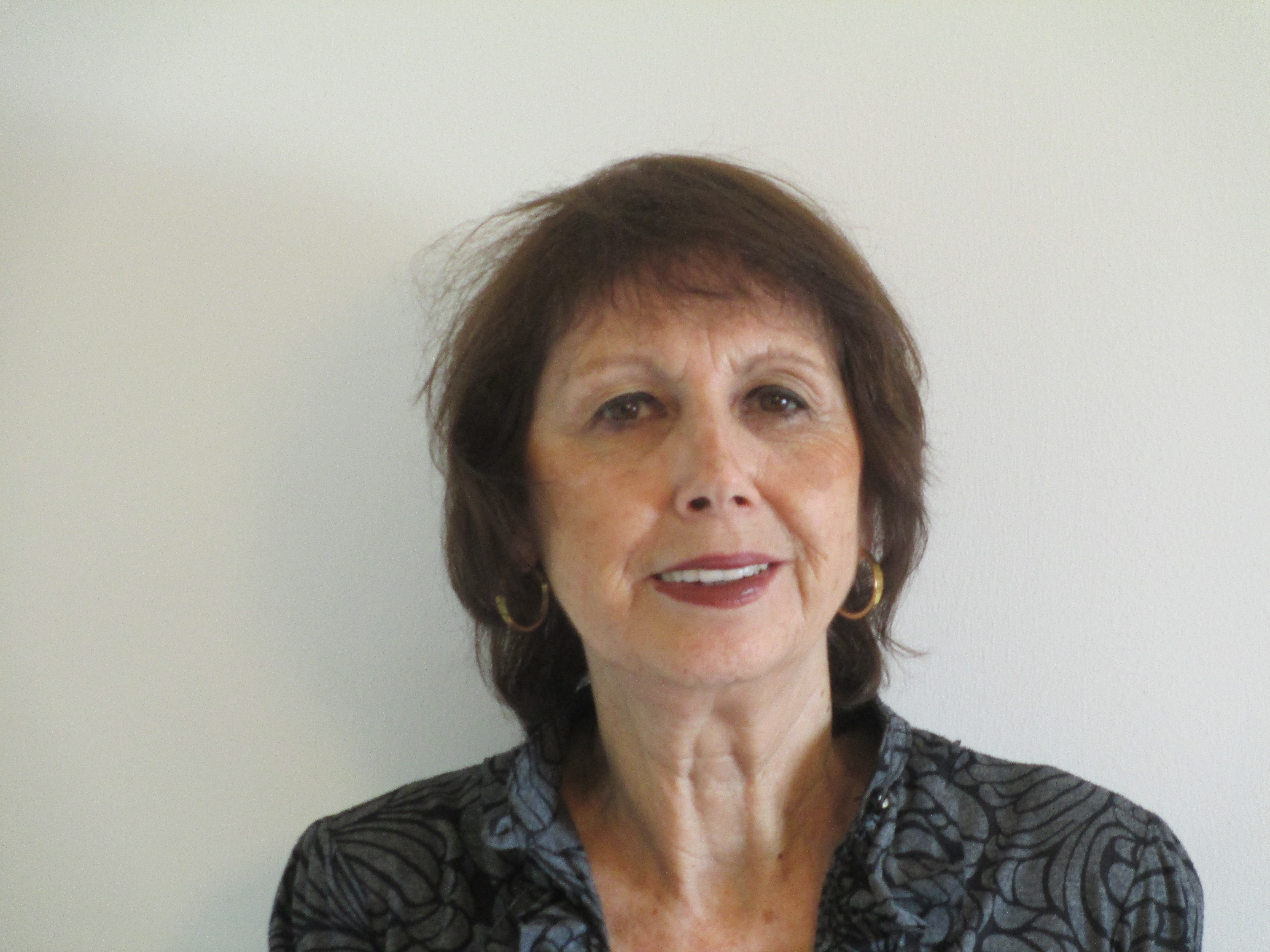 נאוה ביק - אדלר